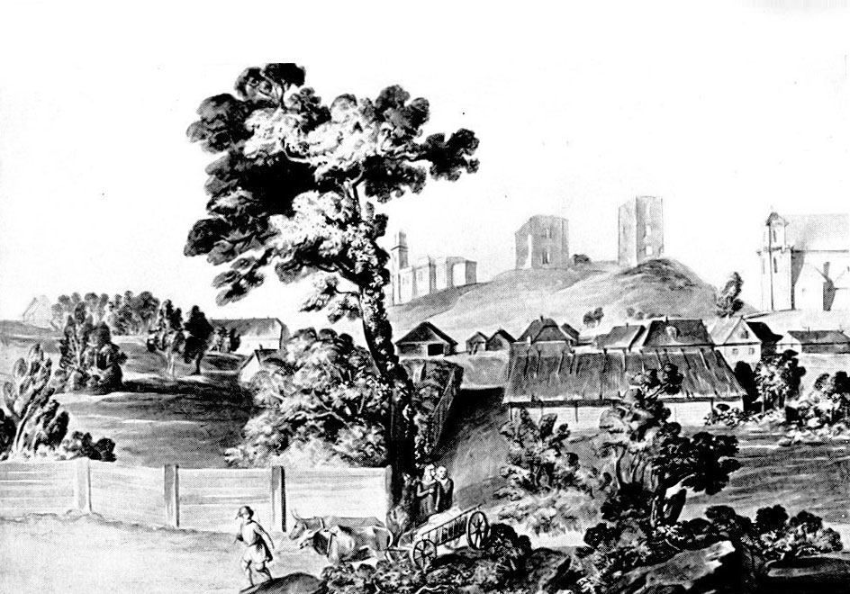 Беларуская (тарашкевіца): Наваградак (Navahradak) на акварэлі Ю. Пешкі